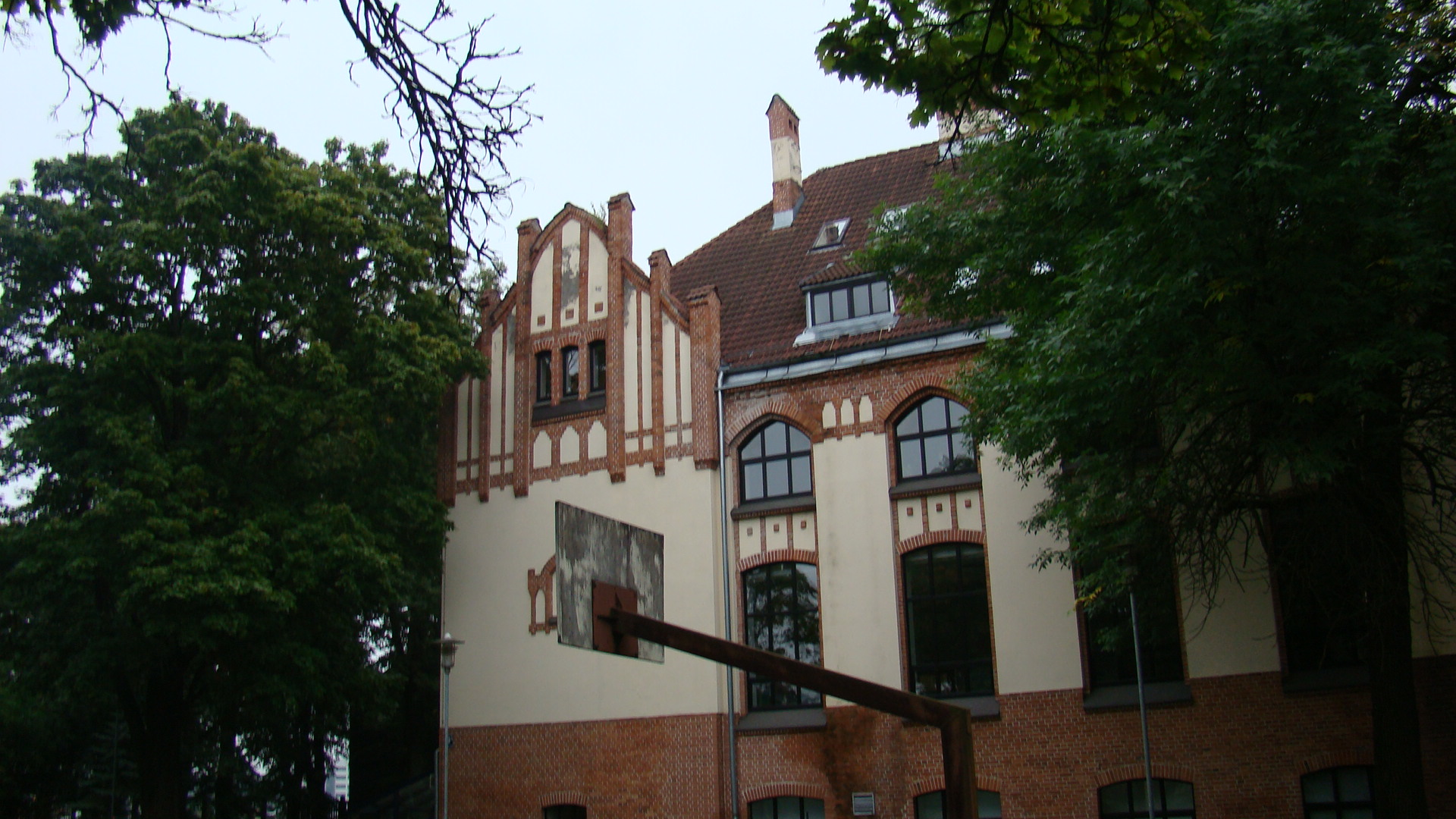 Skola, Rīga, Hāmaņa iela 2a